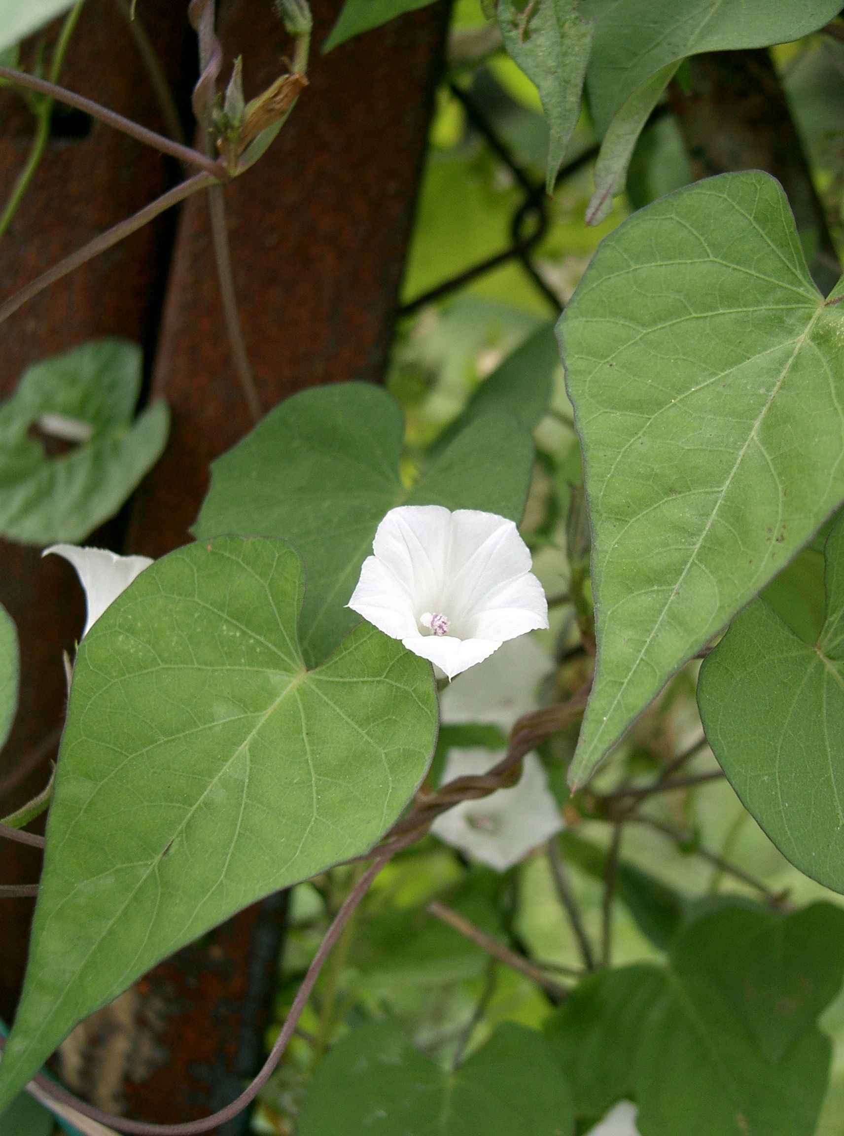 Ipomoea lacunosa